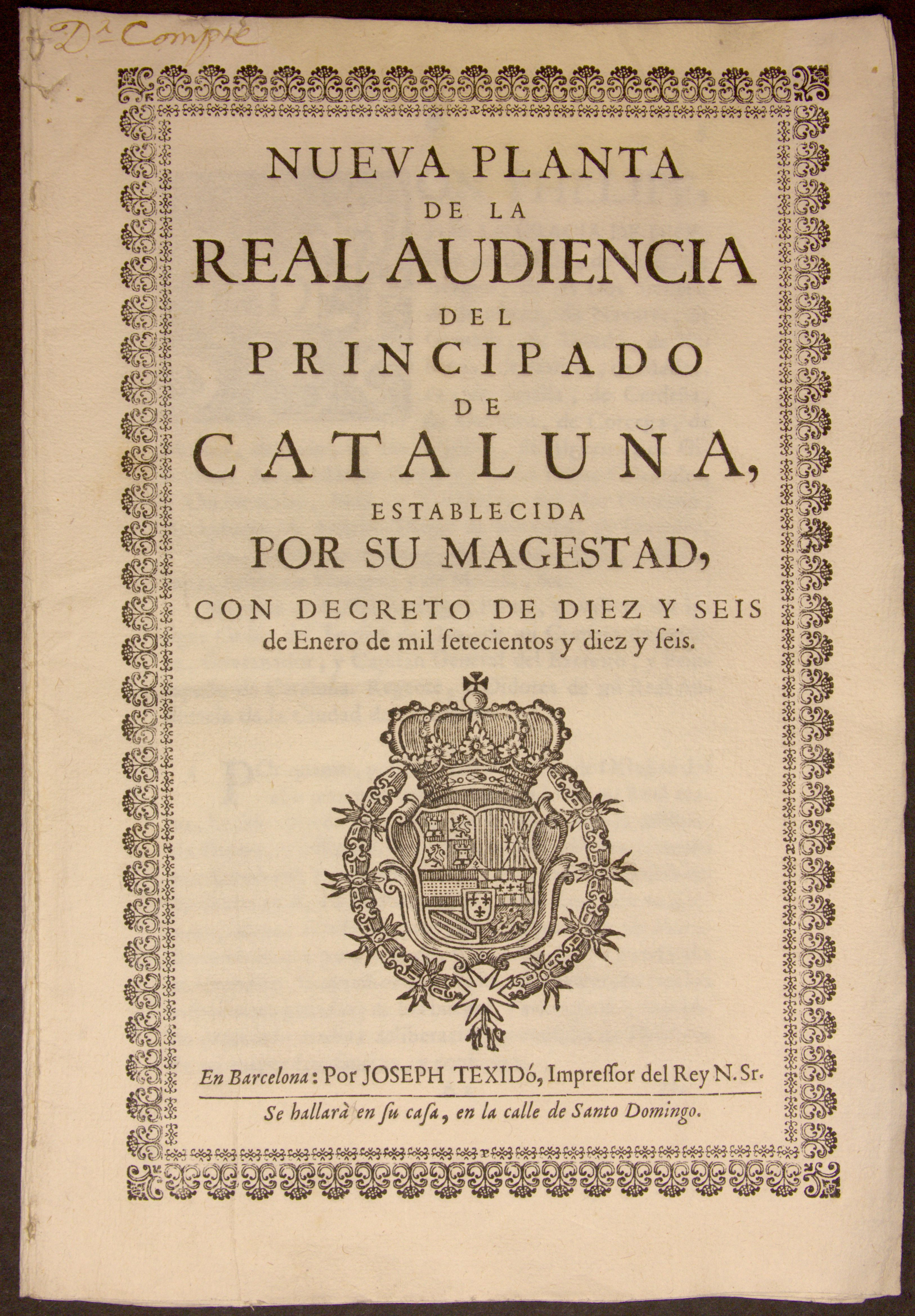 Document de la Nueva planta de la Real Audiencia del Principado de Cataluña. Establerta el 16 de gener de 1716. Aquest exemplar es troba guardat al Museu d'Història de Catalunya. Portada.